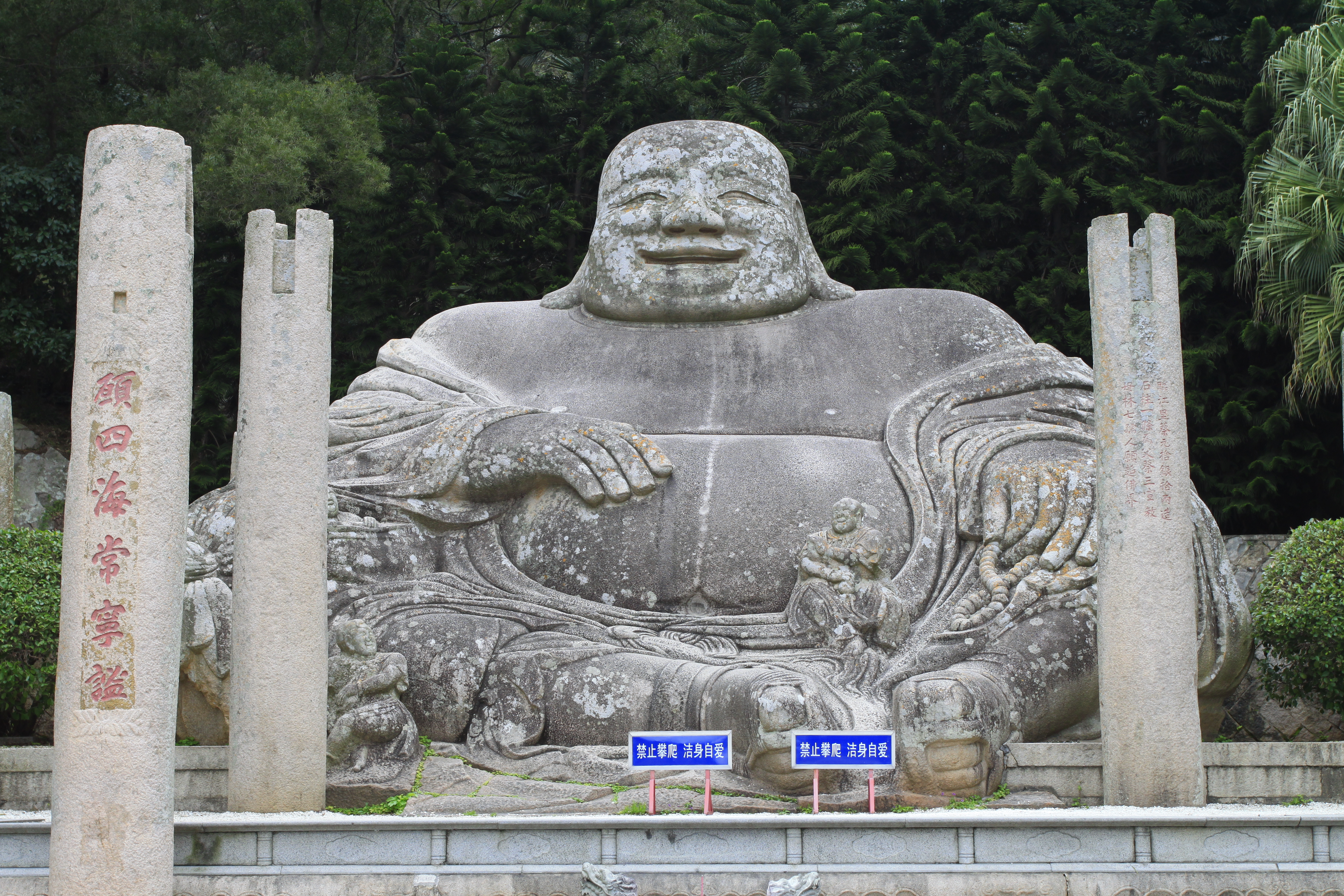 瑞岩弥勒造像，位于中国福建省福清市，是全国重点文物保护单位。